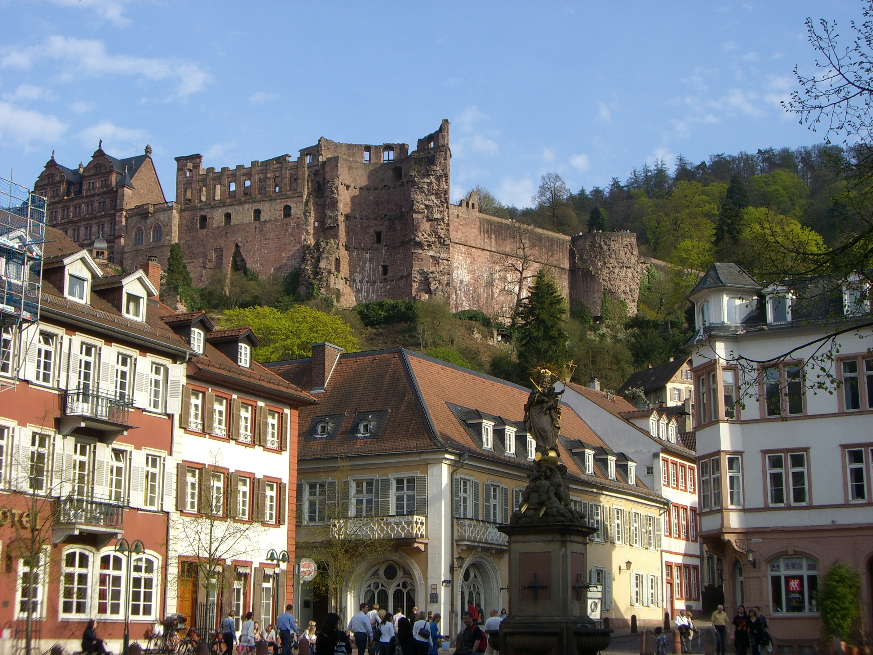 Heidelberger Schloss